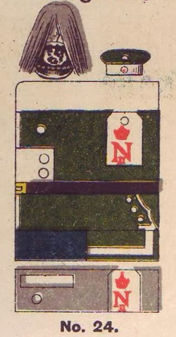 Schematische Farbdarstellung der Uniformen des Leib-Dragoner-Regiments (2. Großherzoglich Hessisches) Nr. 24.